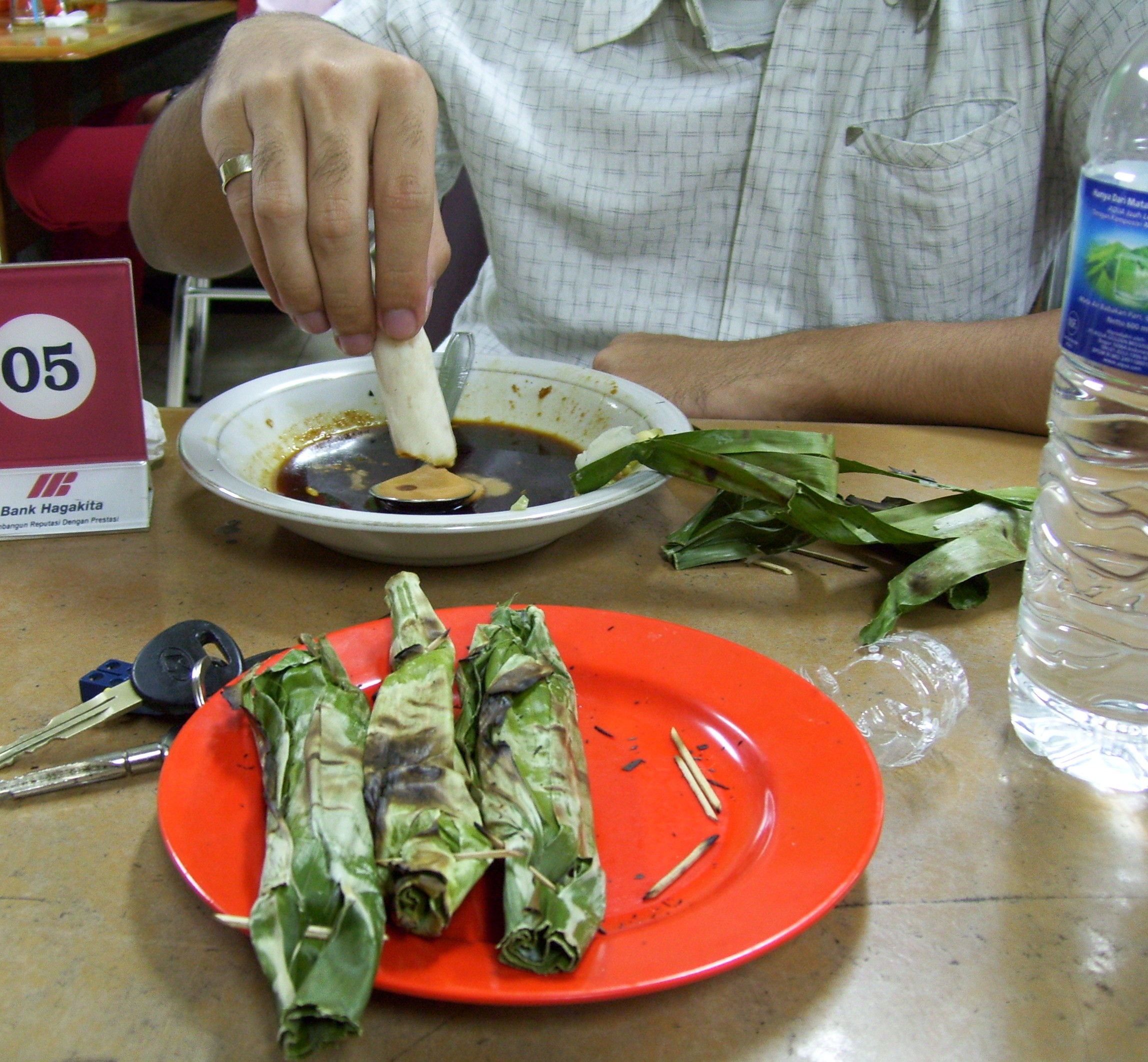 otak-otak